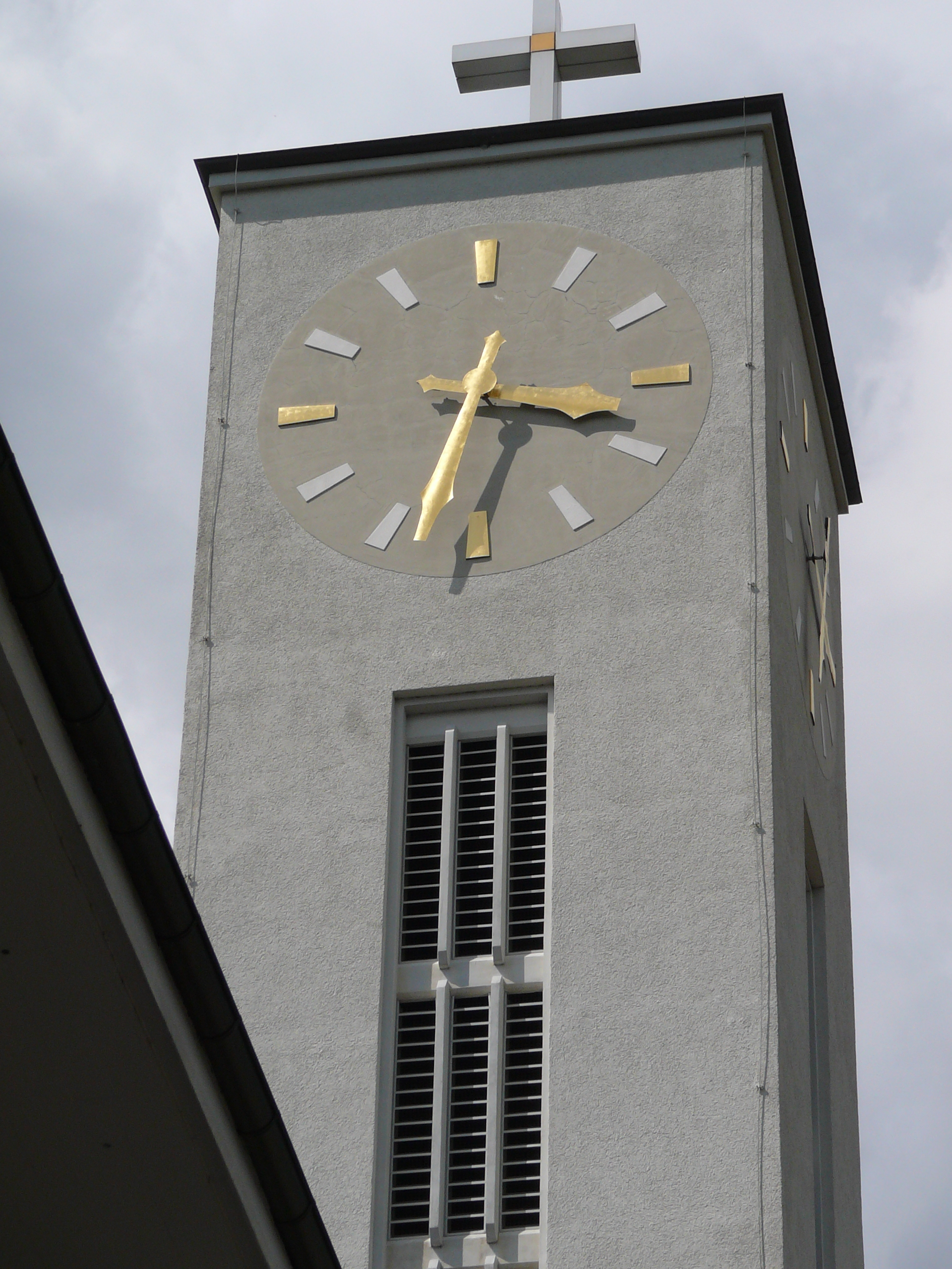 Römisch-katholische Kirche Erlöser Zürich-Riesbach, Kirchturm